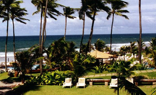 Atlantic Ocean, Salvador, Bahia, Brazil